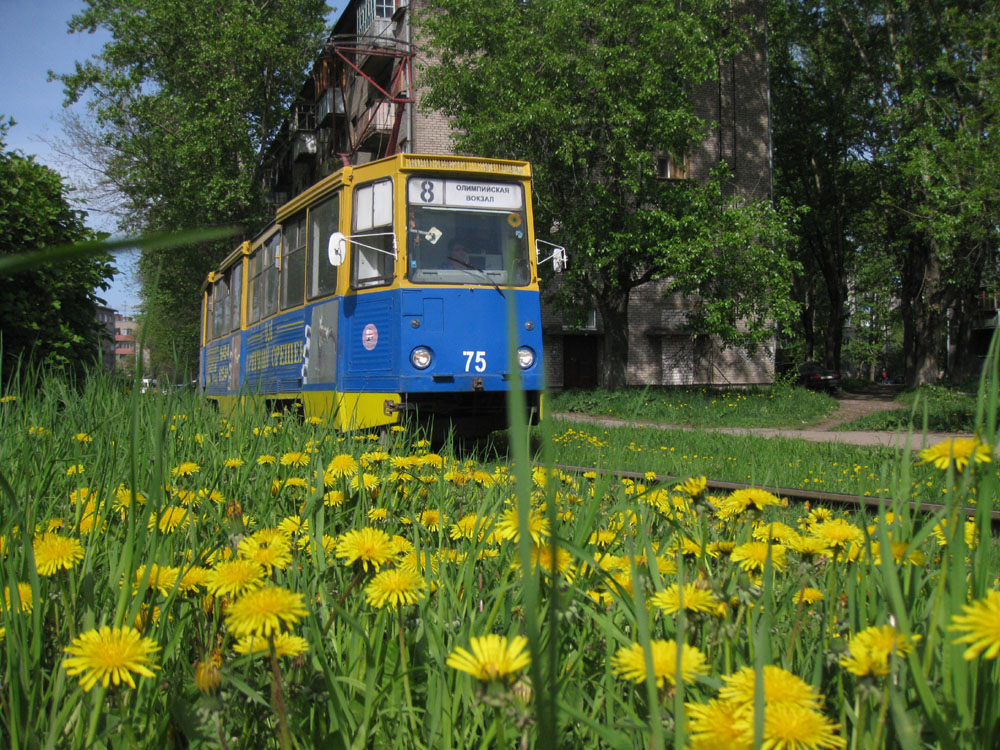 Трамвай №75 8-го маршрута на ул. Вологодской